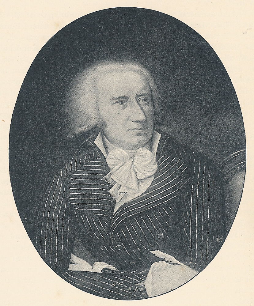 Bernt Anker. 1746-1805. Kammerherre, konferensråd og handelsmand.